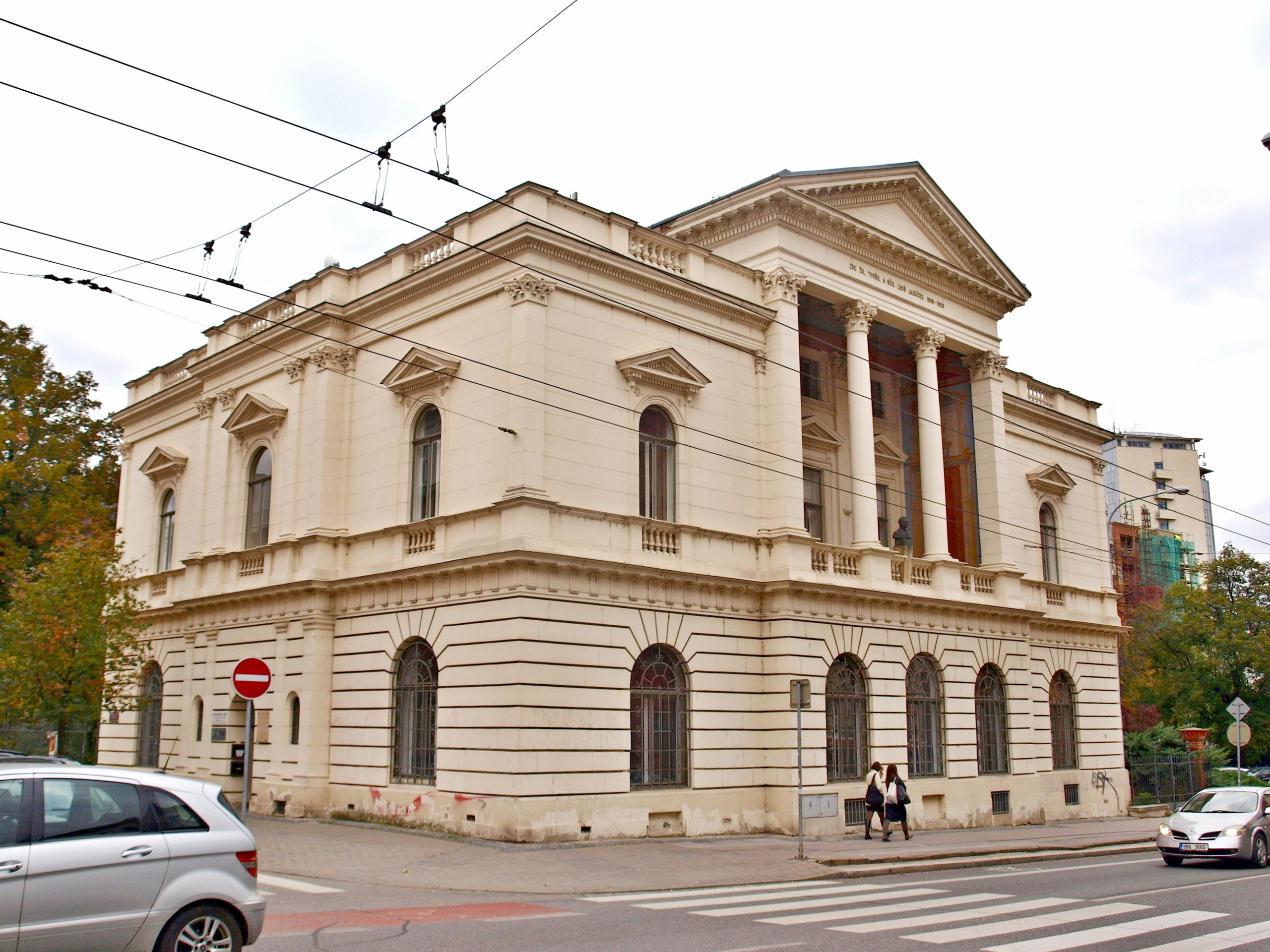 Janáčkova varhanická škola v Brně